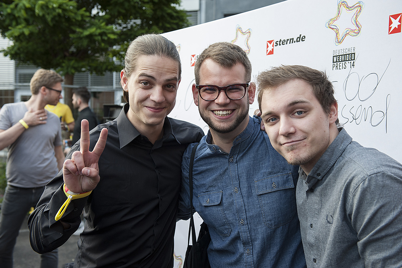 Auf dem Foto zu sehen sind (von links nach rechts) Jakob Joiko, Felix Denzer (beide Fewjar) und Max Krüger (Frodoapparat).